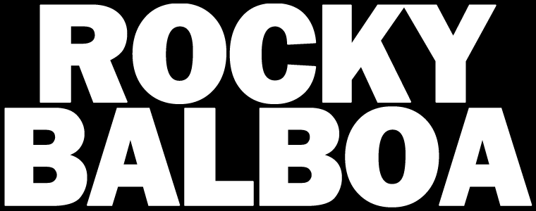 Rocky Balboa (Film) Logo